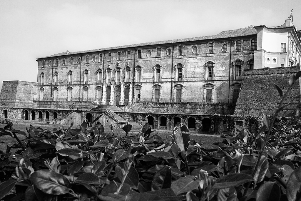 Parco Ducale - MIBAC This is a photo of a monument which is part of cultural heritage of Italy.